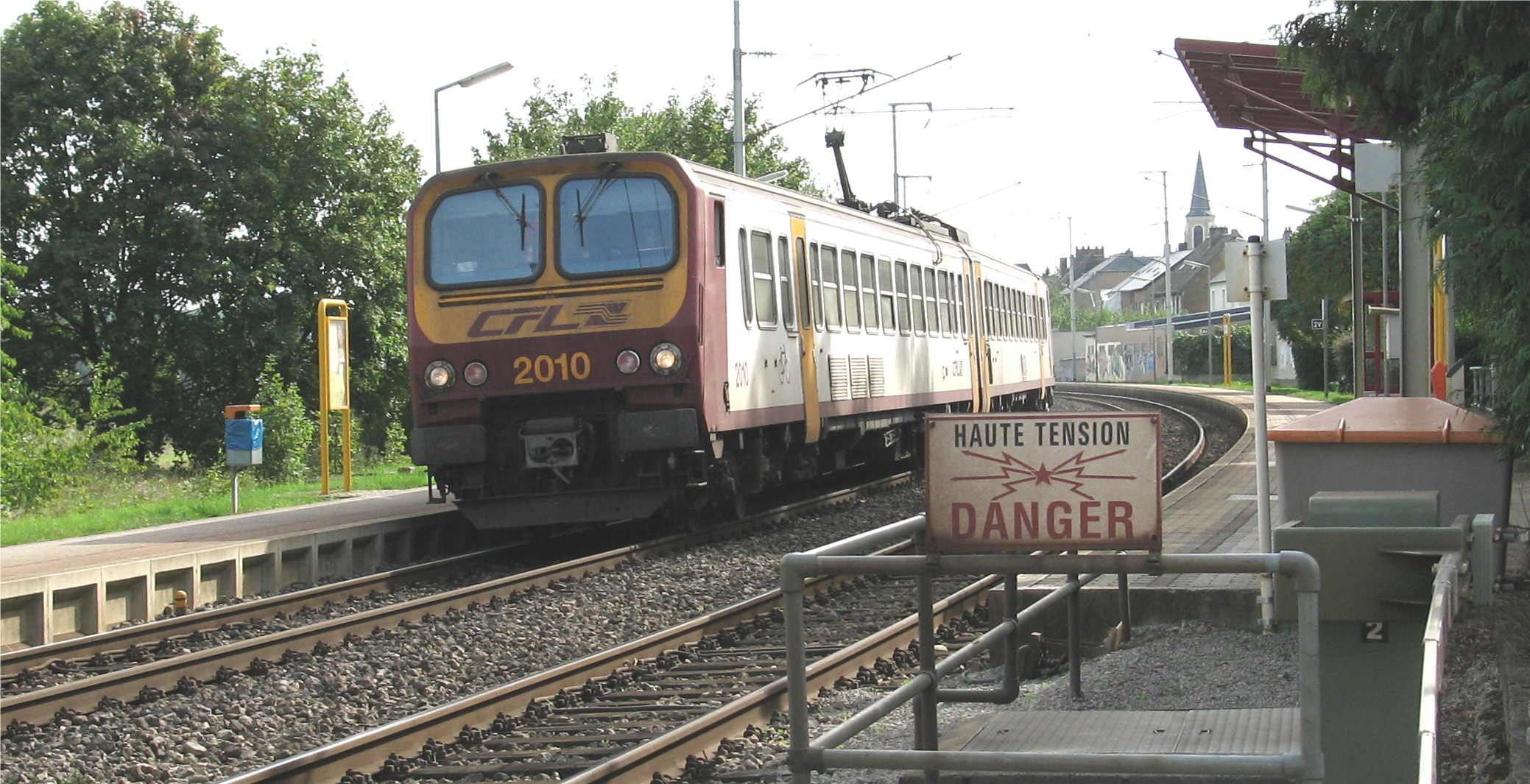 Gare Mënsbech mat Zuch